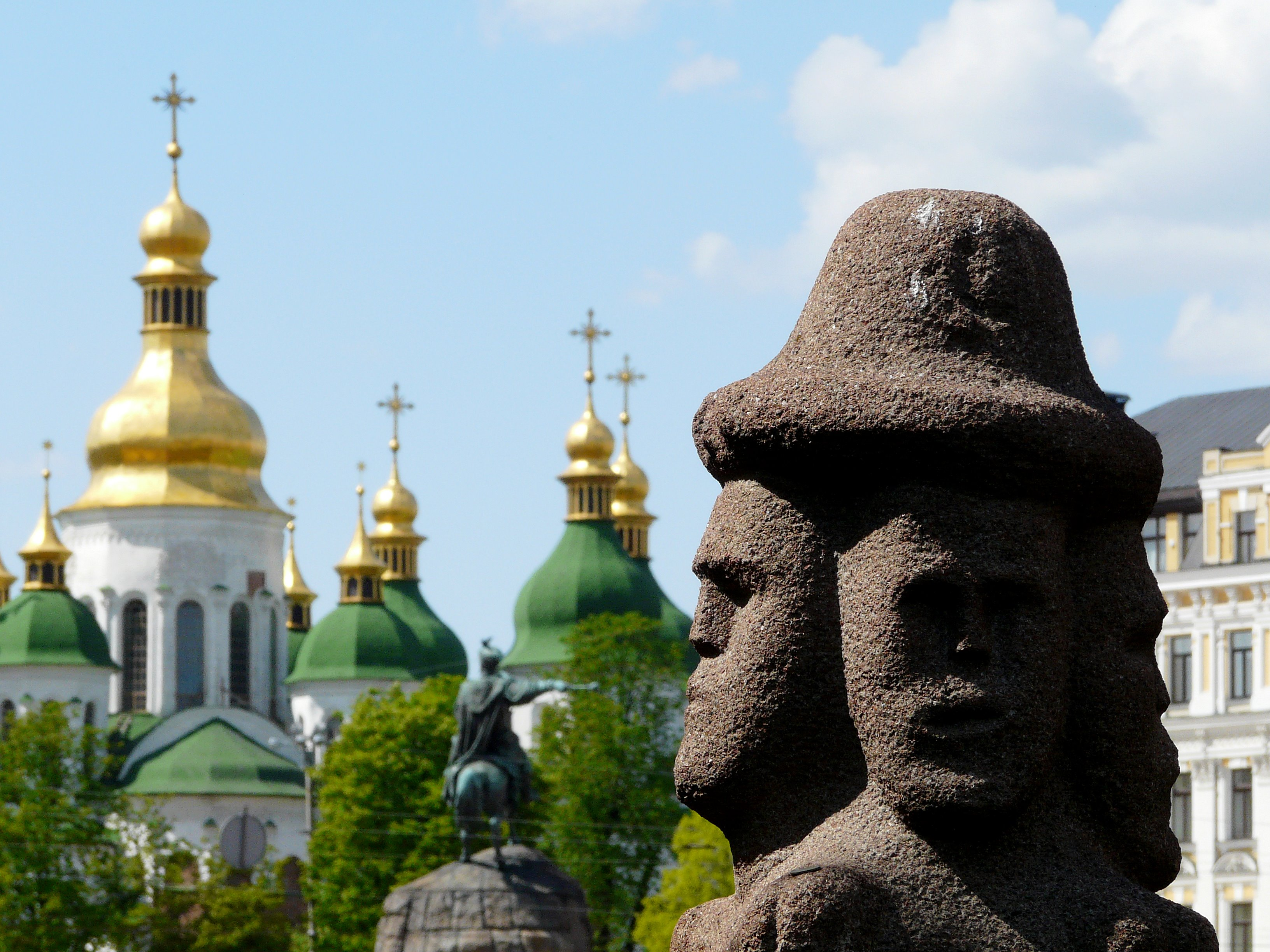 Комплекс Національного заповідника «Софія Київська», Київ, Володимирська вул., 24